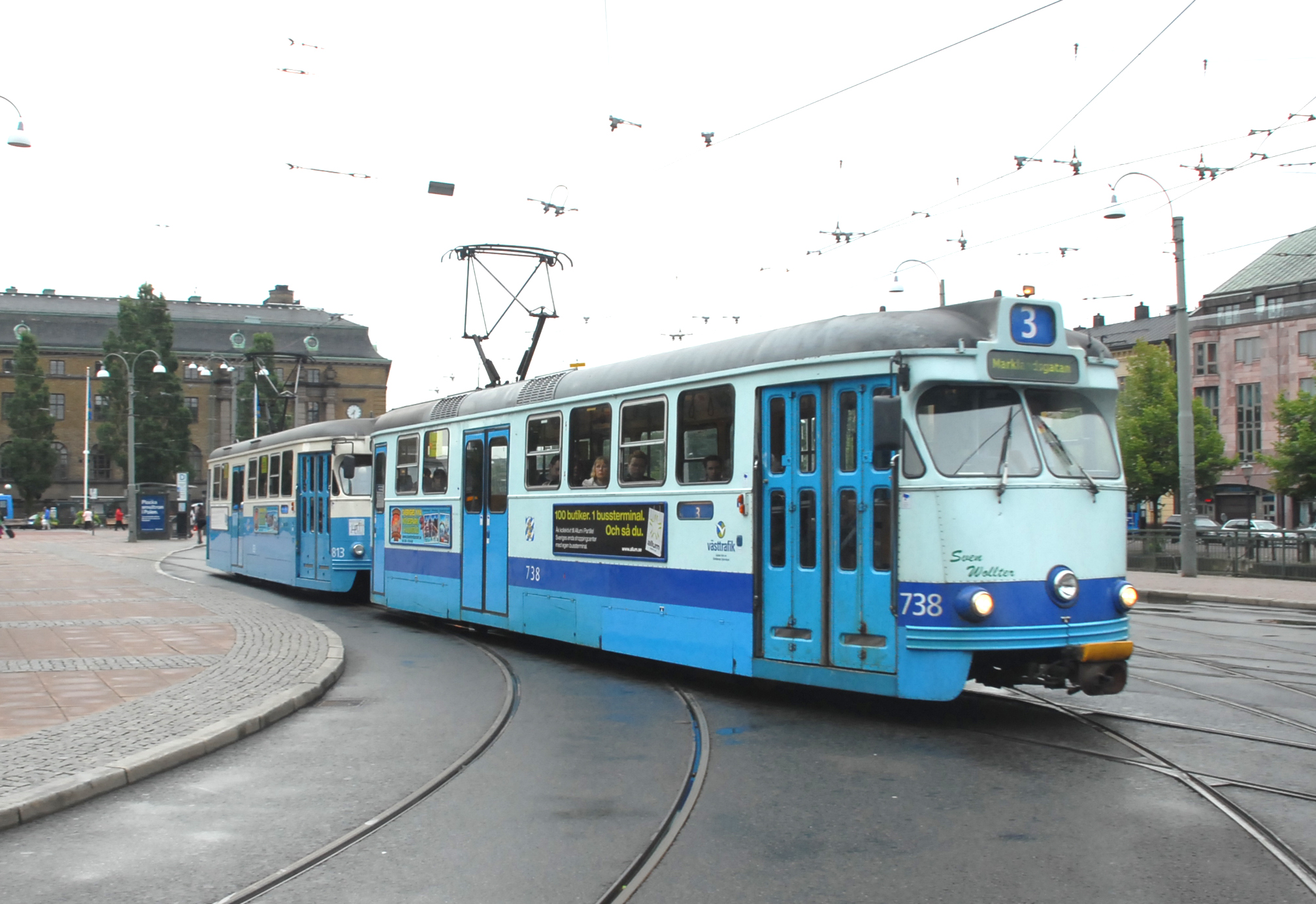 Göteborgs Spårvägar AB tram 738 (M28) en 813 (M29) te te Göteborg.